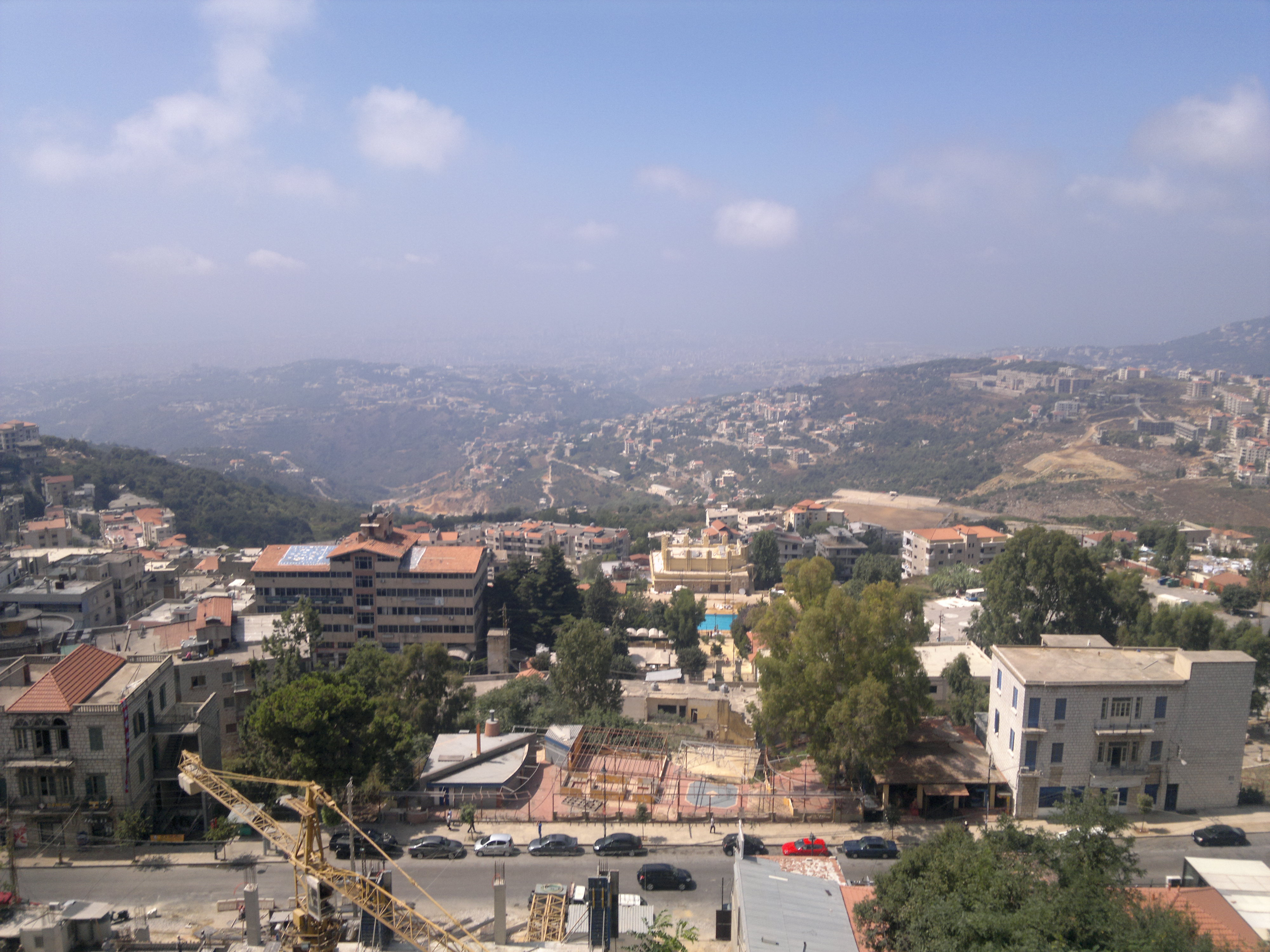 Aaraiya, Lebanon